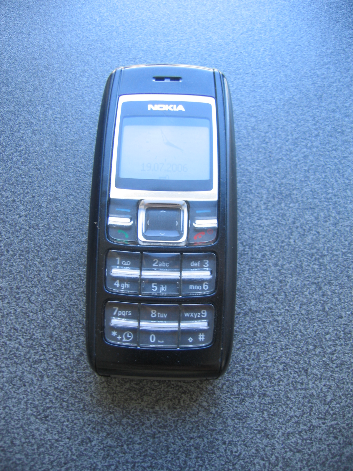 Nokia 1600 Pildi autor: Mardus